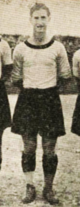 Ο Κλεάνθης Μαρόπουλος προπολεμικά